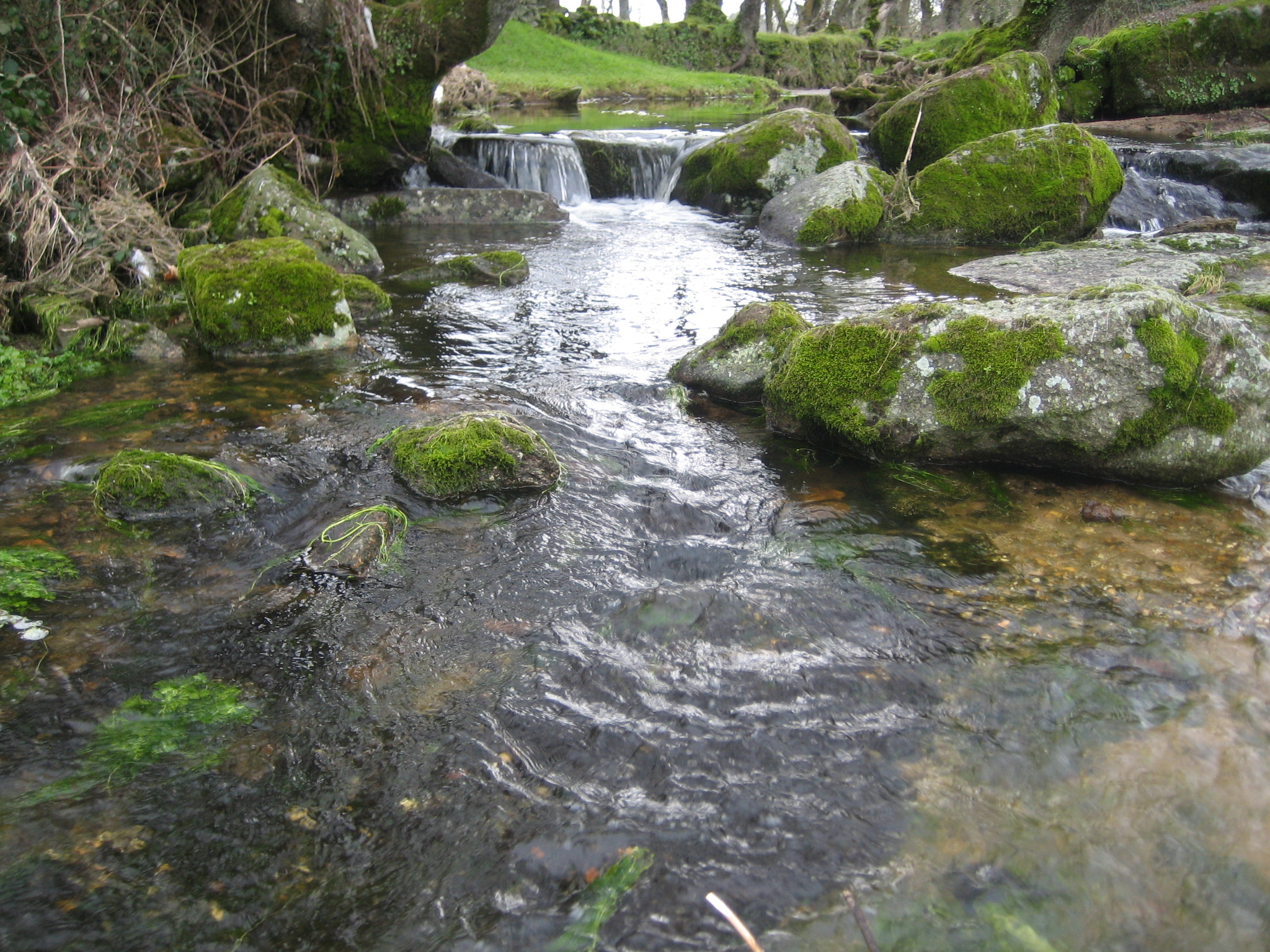 Ribera de Tudera –Zamora–.